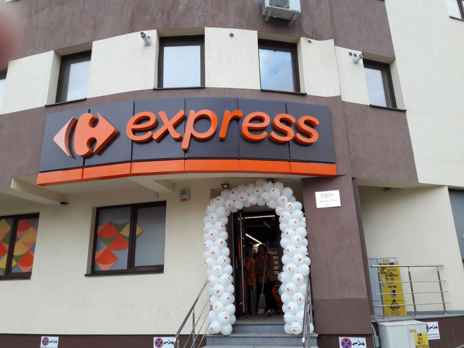 Magazin Carrefour Express din Iaşi